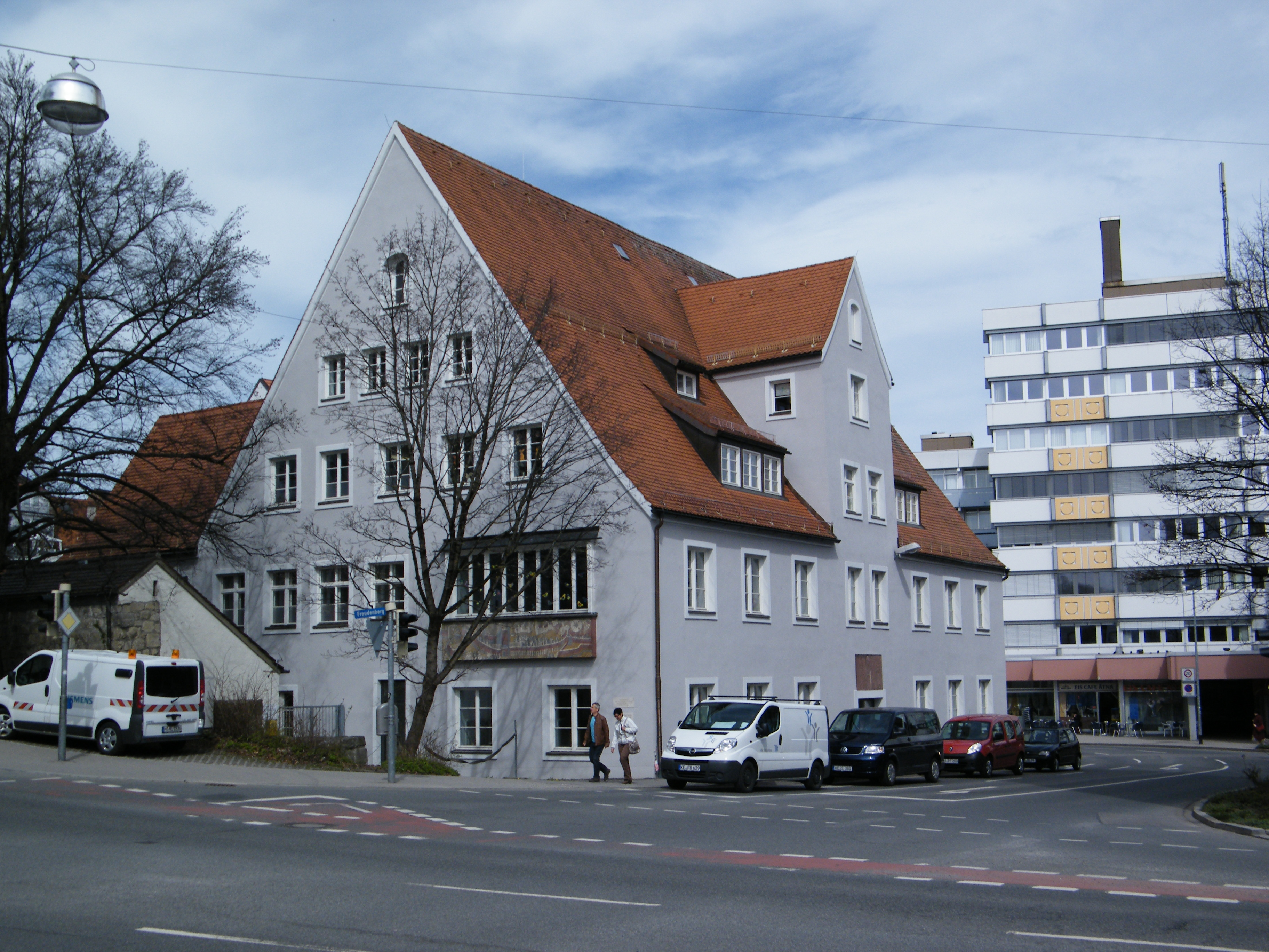 Evangelisch-lutheranisches Waisenhaus in Kempten